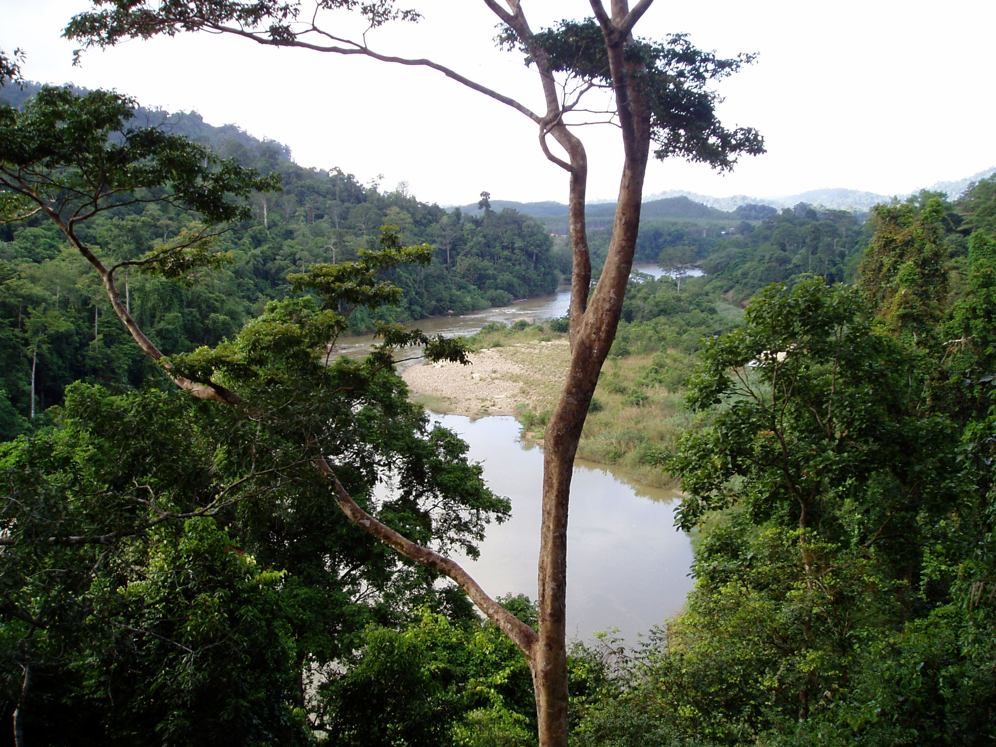 Canopy Walk View